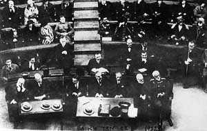 Tribunal militaire du Procès des Six à Athènes